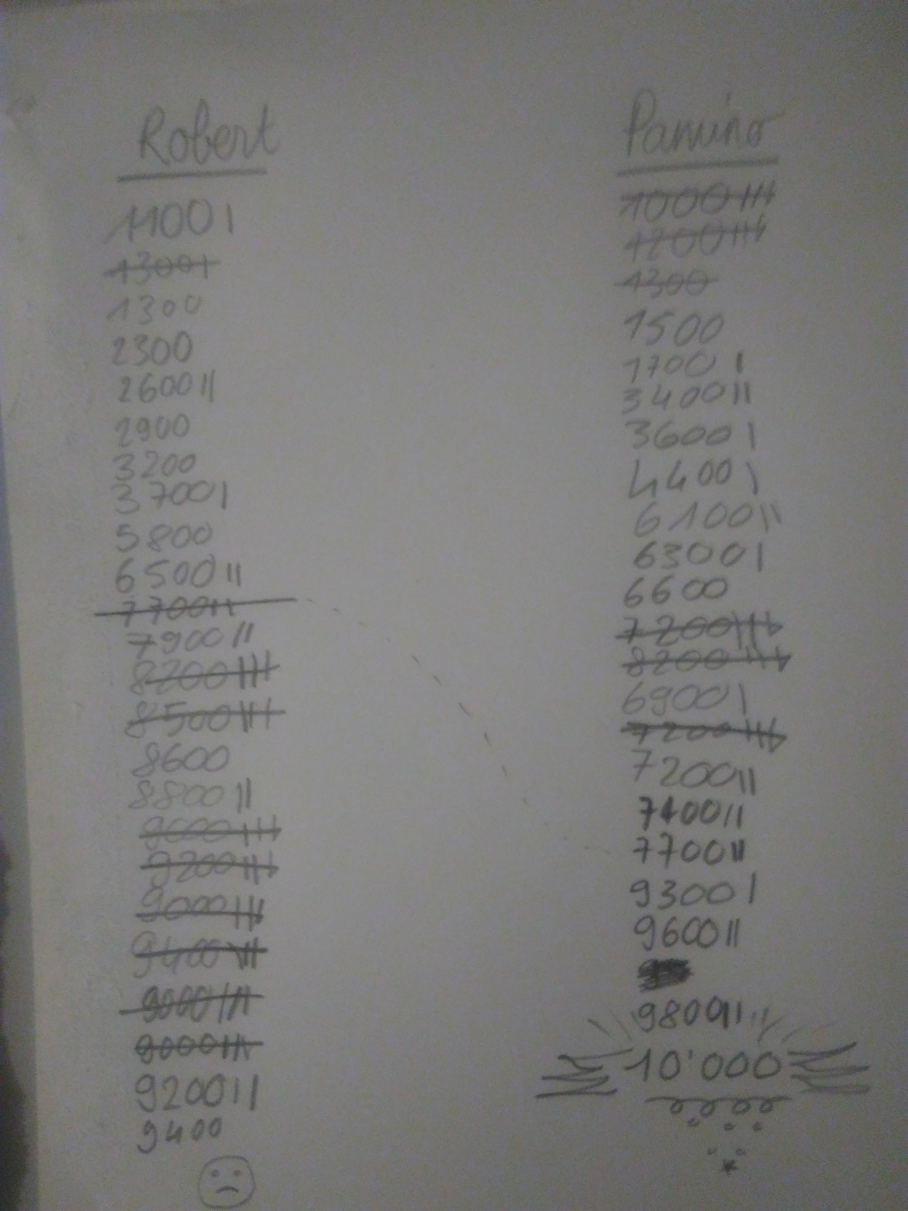 Exemple de notation des scores à 2 joueurs